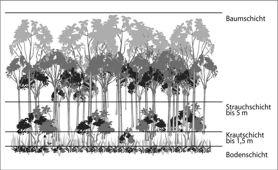 Stratifikation, schematisch: vertikale Gliederung der Vegetation im Wald